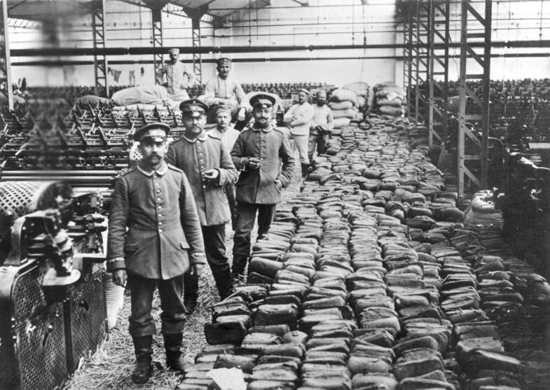 Deutsche Mehl- und Brotvorräte lagern in einer Weberei auf östlichem Kriegsschauplatz